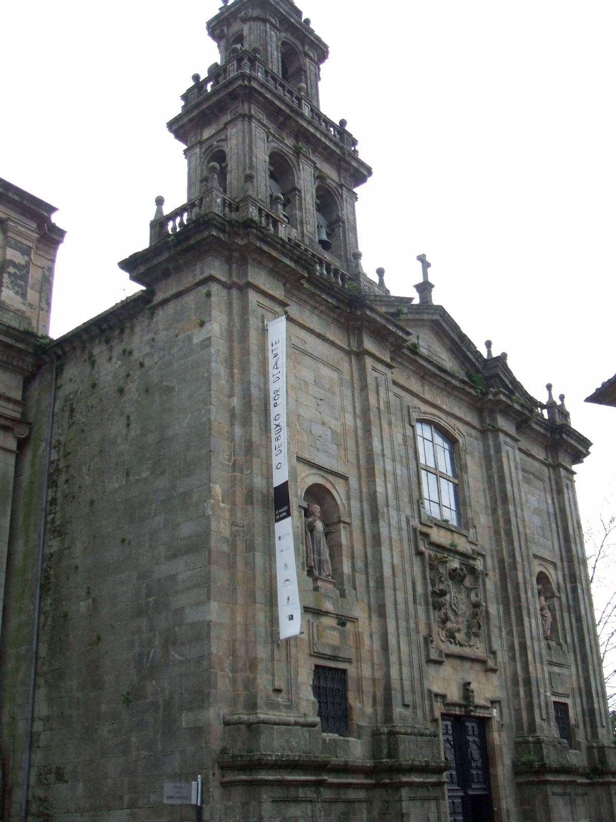 Santiago de Compostela - Iglesia de la Compañia de Jesus